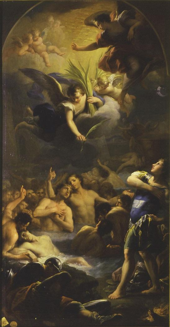 La obra representa el martirio de San Melitón y de los cuarenta mártires de Sebaste de la Legio XII Fulminata, que según la tradición fueron condenados a quedar expuestos desnudos durante la noche sobre una laguna helada cerca de Sebaste. Esta obra es un boceto preparatorio para el cuadro pintado por Mariano Salvador Maella para el retablo mayor de la iglesia del convento dei Santi Quaranta Martiri de Roma. En 1762 la Real Academia de Bellas Artes de San Fernando, en nombre de los religiosos franciscanos de Roma, encargó a Maella la realización del cuadro, que fue pintado durante la estancia del pintor en Roma.